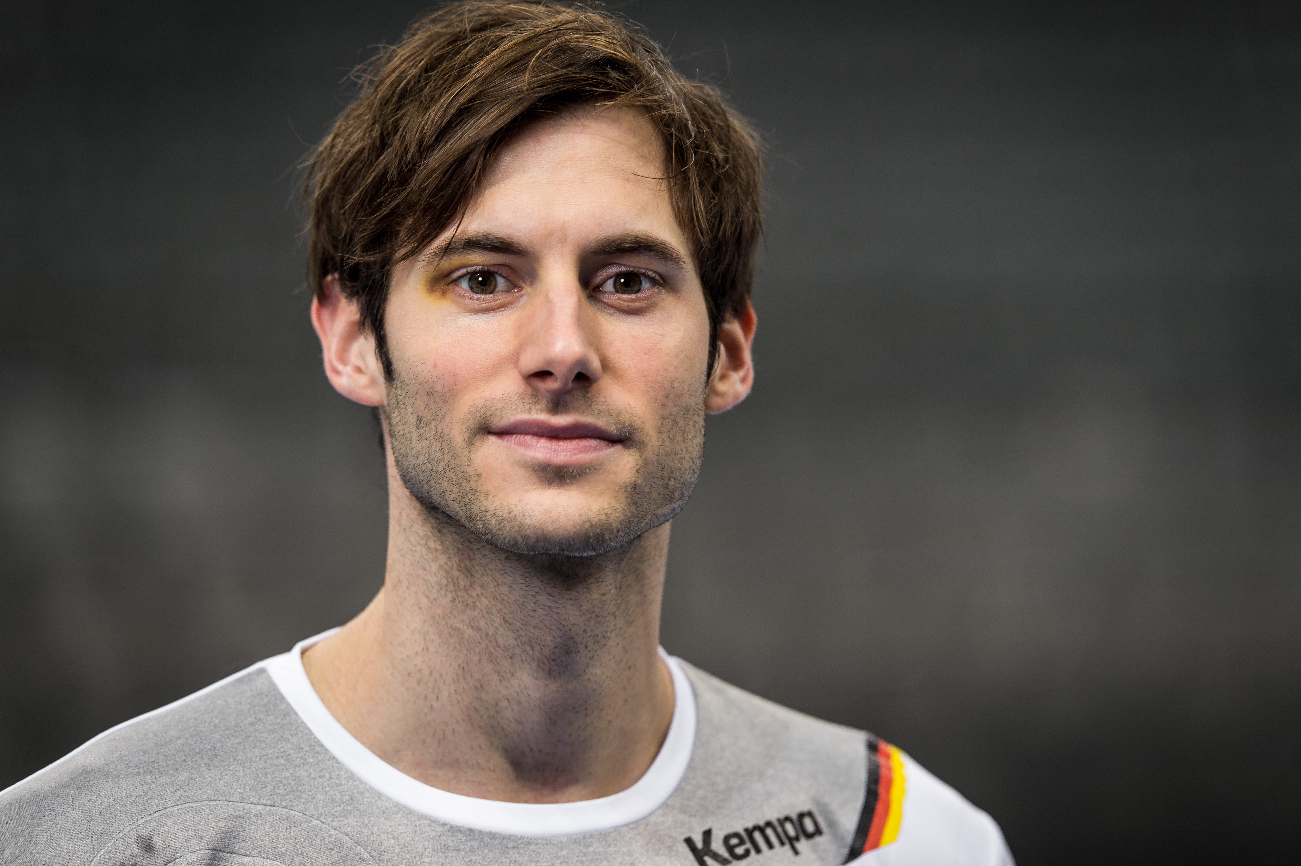 Pressetermin der Deutschen Handballnationalmannschaft am 4. Januar 2018 in der Porsche-Arena in Stuttgart